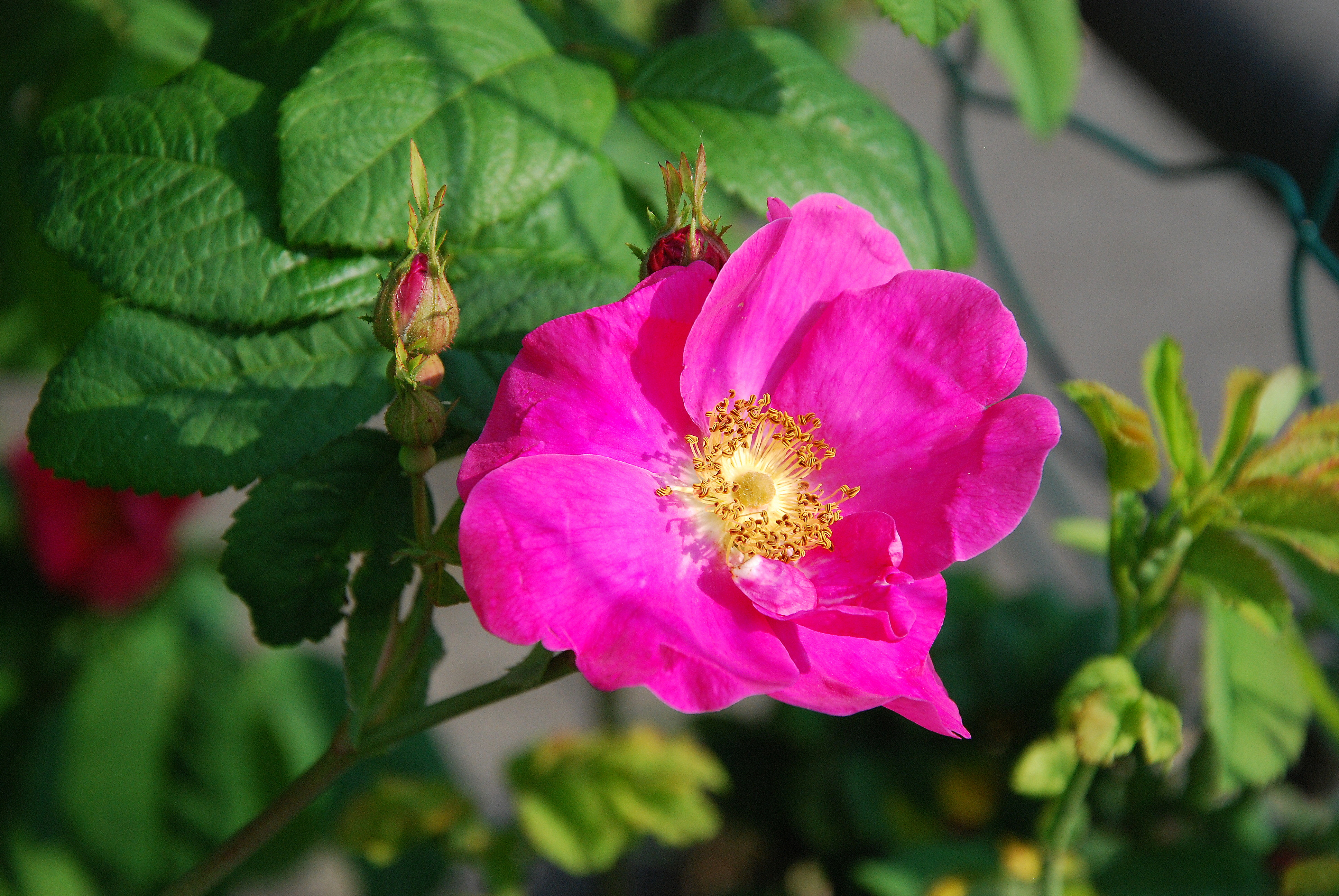 Rose gallique ou rosier de France. A l'origine d'une multitude d'hybridations.